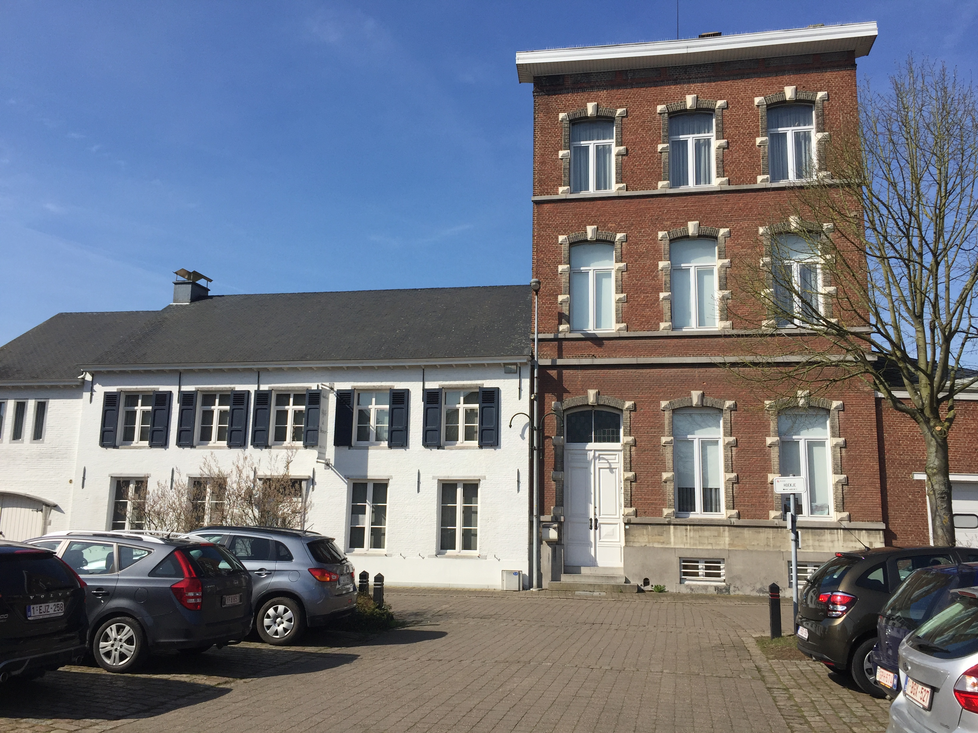 woning op het Werchterplein